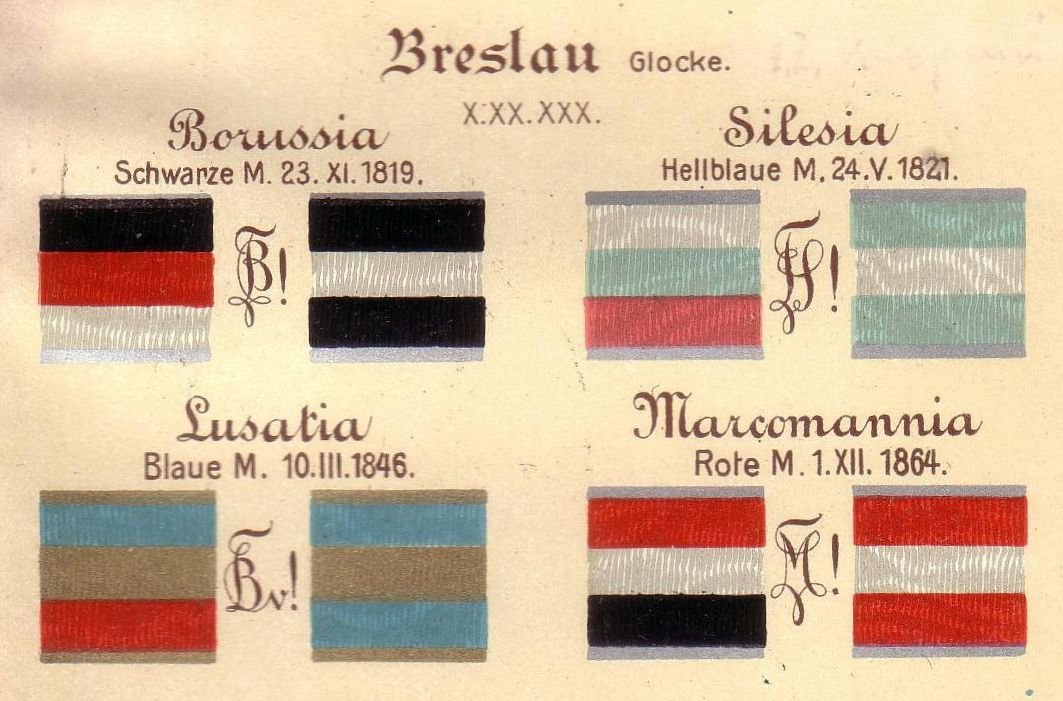 Couleur und Zirkel der Breslauer Corps